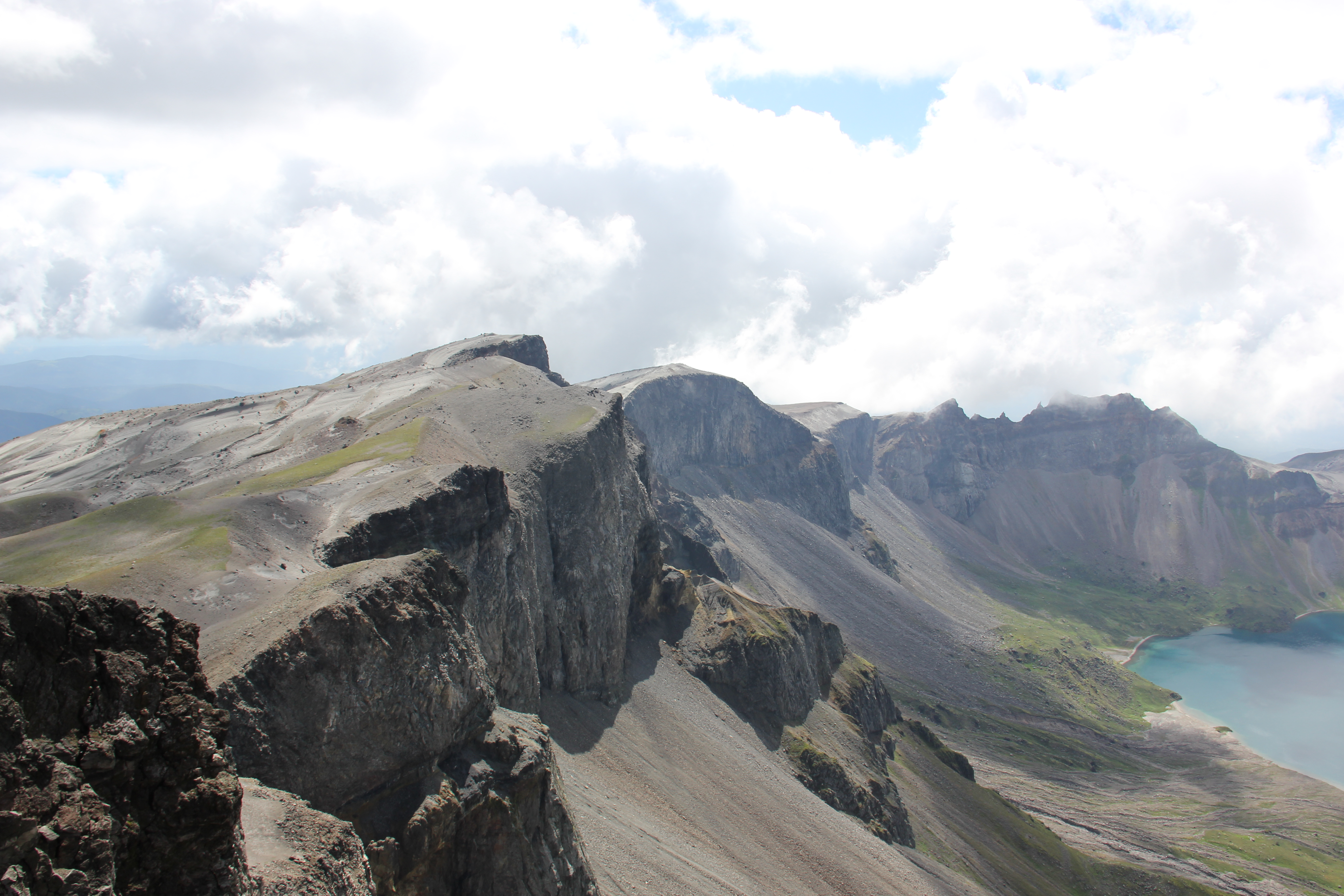 Mt. Paekdu